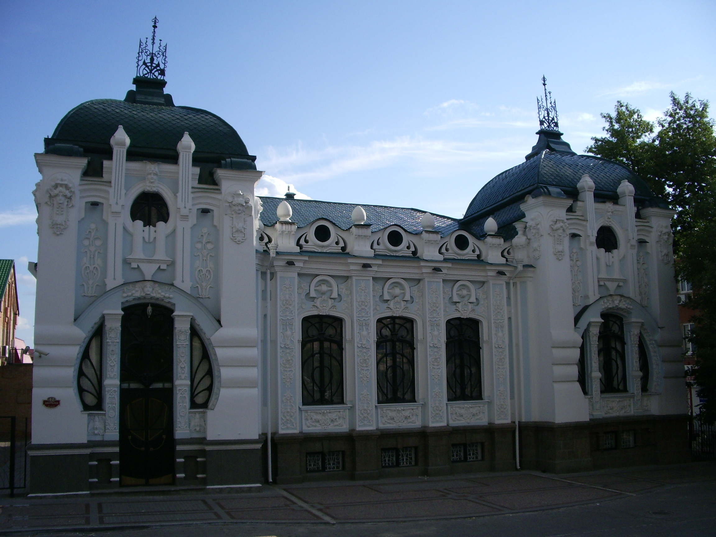 Кіровоградський обласний краєзнавчий музей